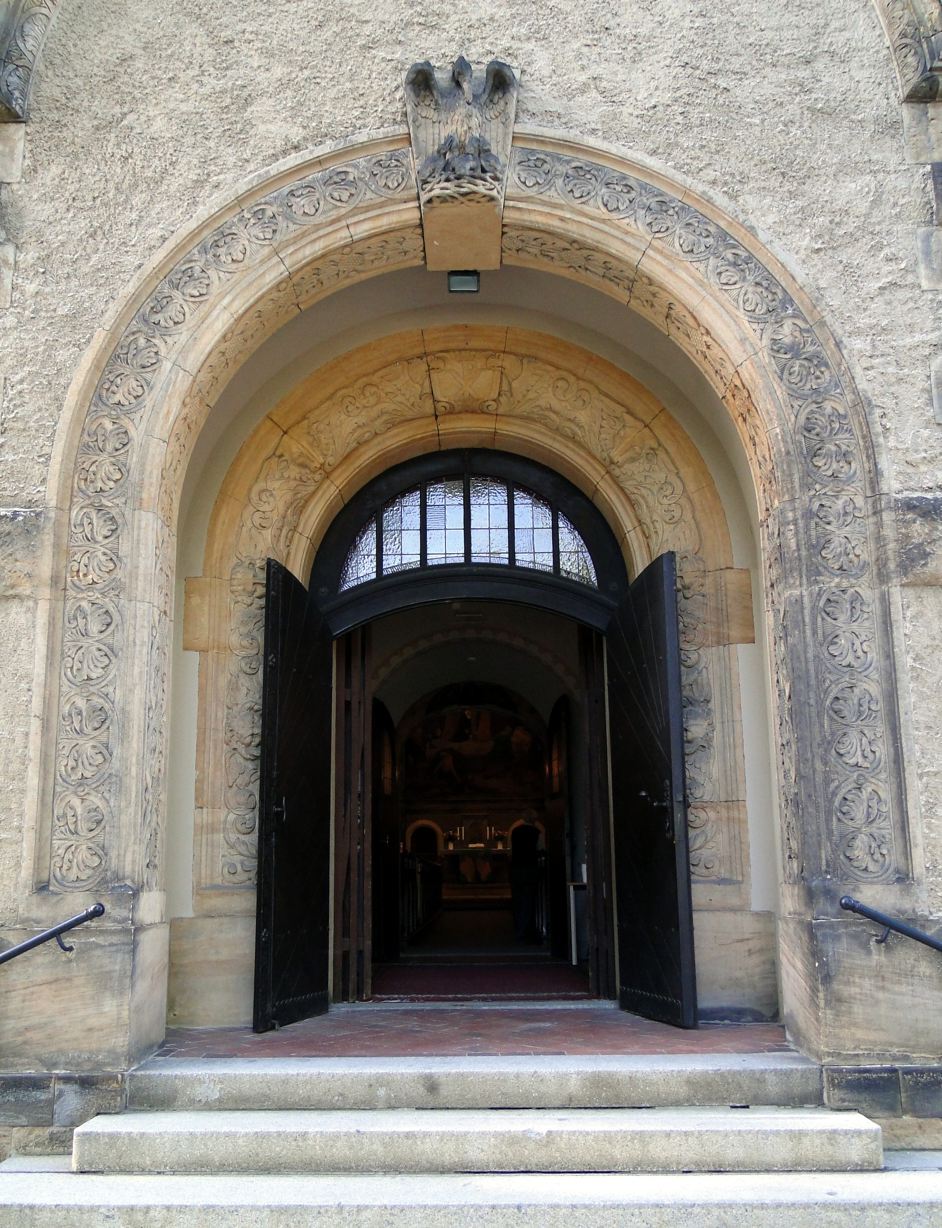 Christuskirche Dresden-Klotzsche inneres und äußeres Westportal